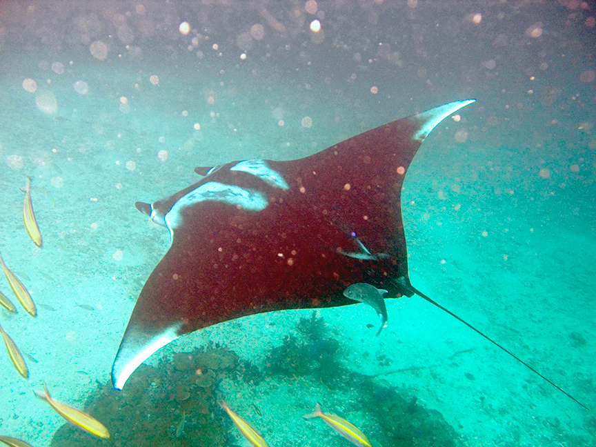 Manta Ray (Manta birostris) at Hin Muang, Thailand. "Neon Fusilier & Manta Ray".